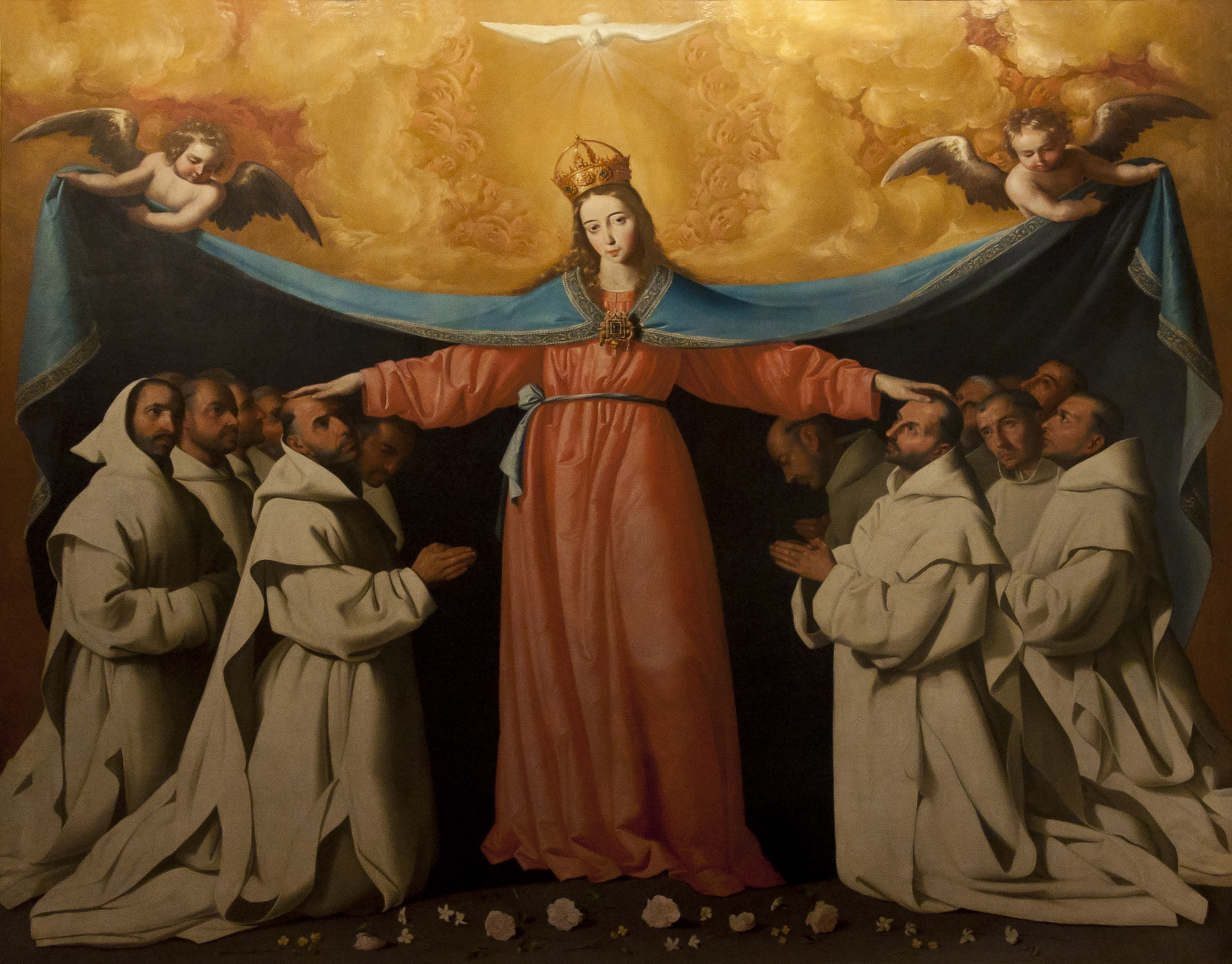 Francisco Zurbarán - La Virgen de las Cuevas - Sevilla Bellas Artes